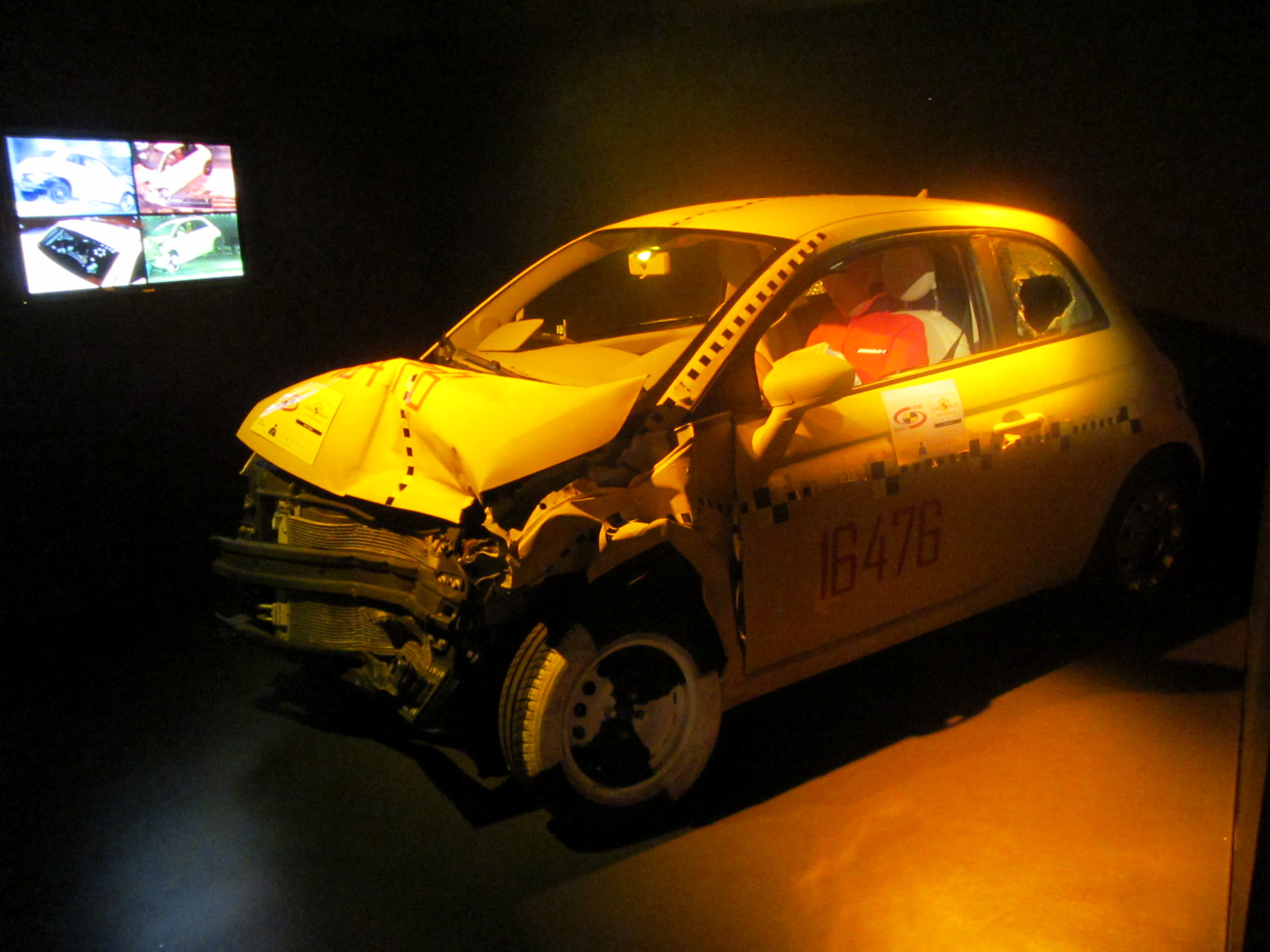 esposizione di una Fiat 500 sottoposta al crash test (5 stelle) presso il Museo Nazionale dell'Automobile di Torino